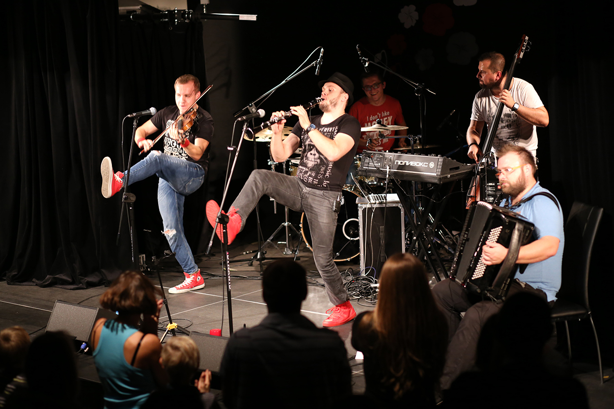 Podczas koncertu w Raszynie (2015)